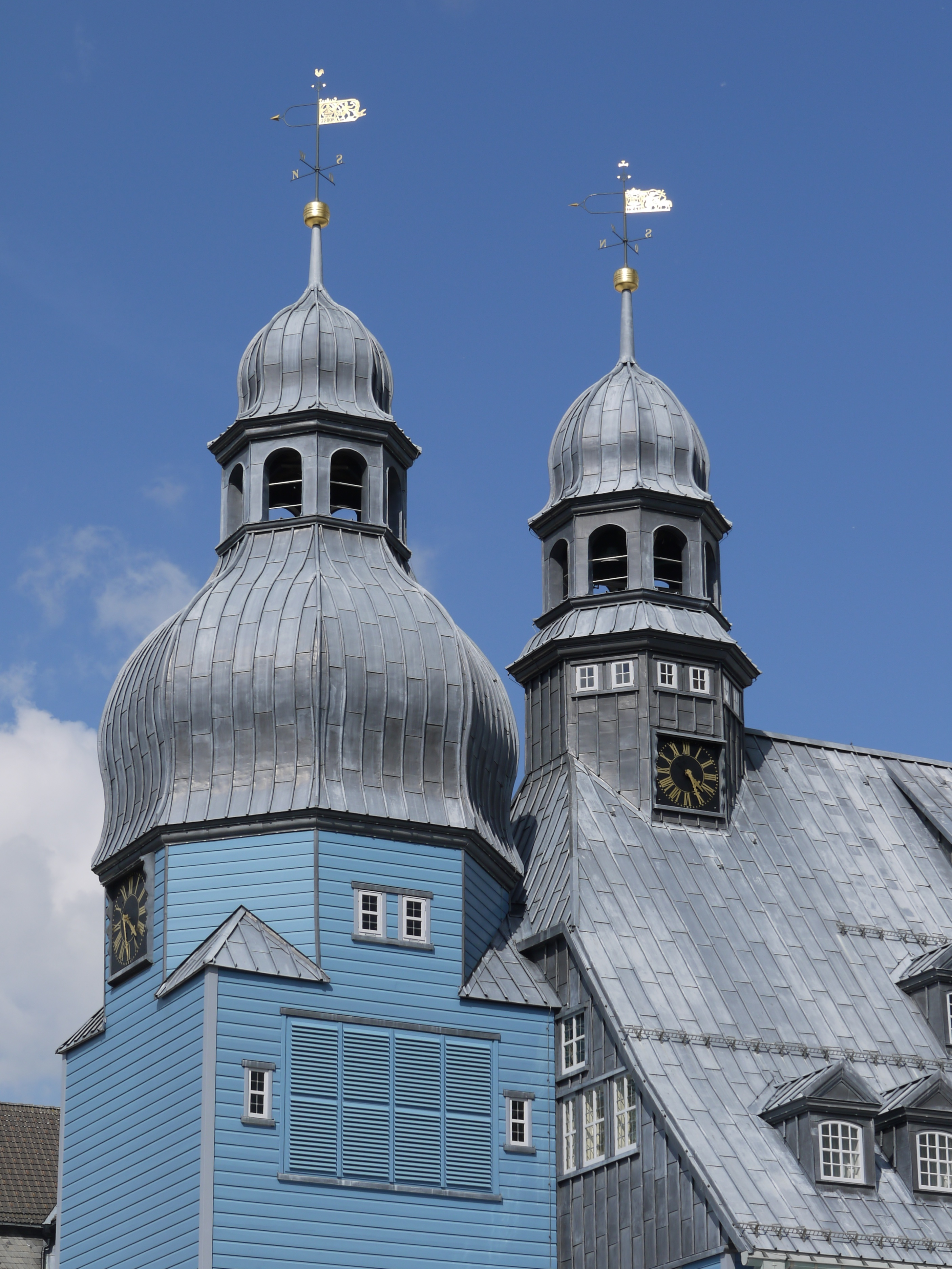 Marktkirche zum Heiligen Geist in Clausthal-Zellerfeld - Glockenturm und Dachreiter mit Turmuhr - Ansicht von Südwesten